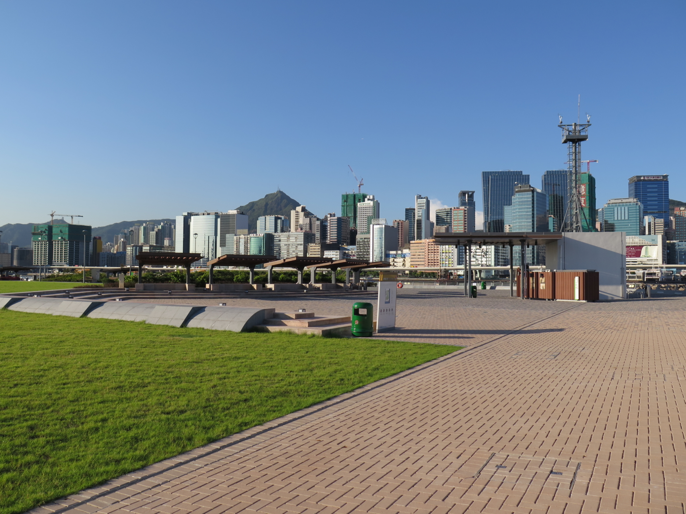 Kai Tak Runway Park Open Plaza